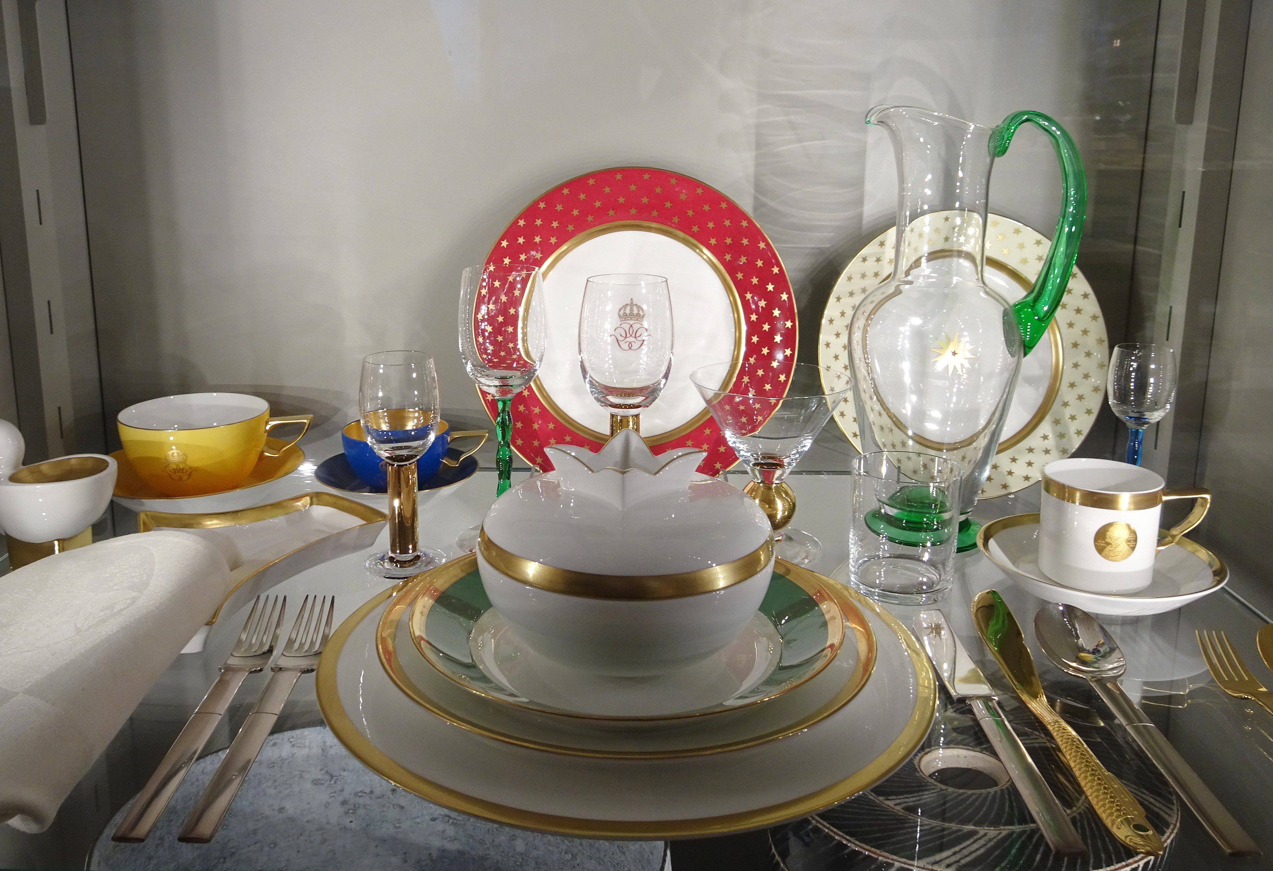 Nobelservisen, formgivning Karin Björquist (porslin) och Gunnar Cyrén (dricksglas och bestick) till Nobelprisets 90-årsjubileum 1991